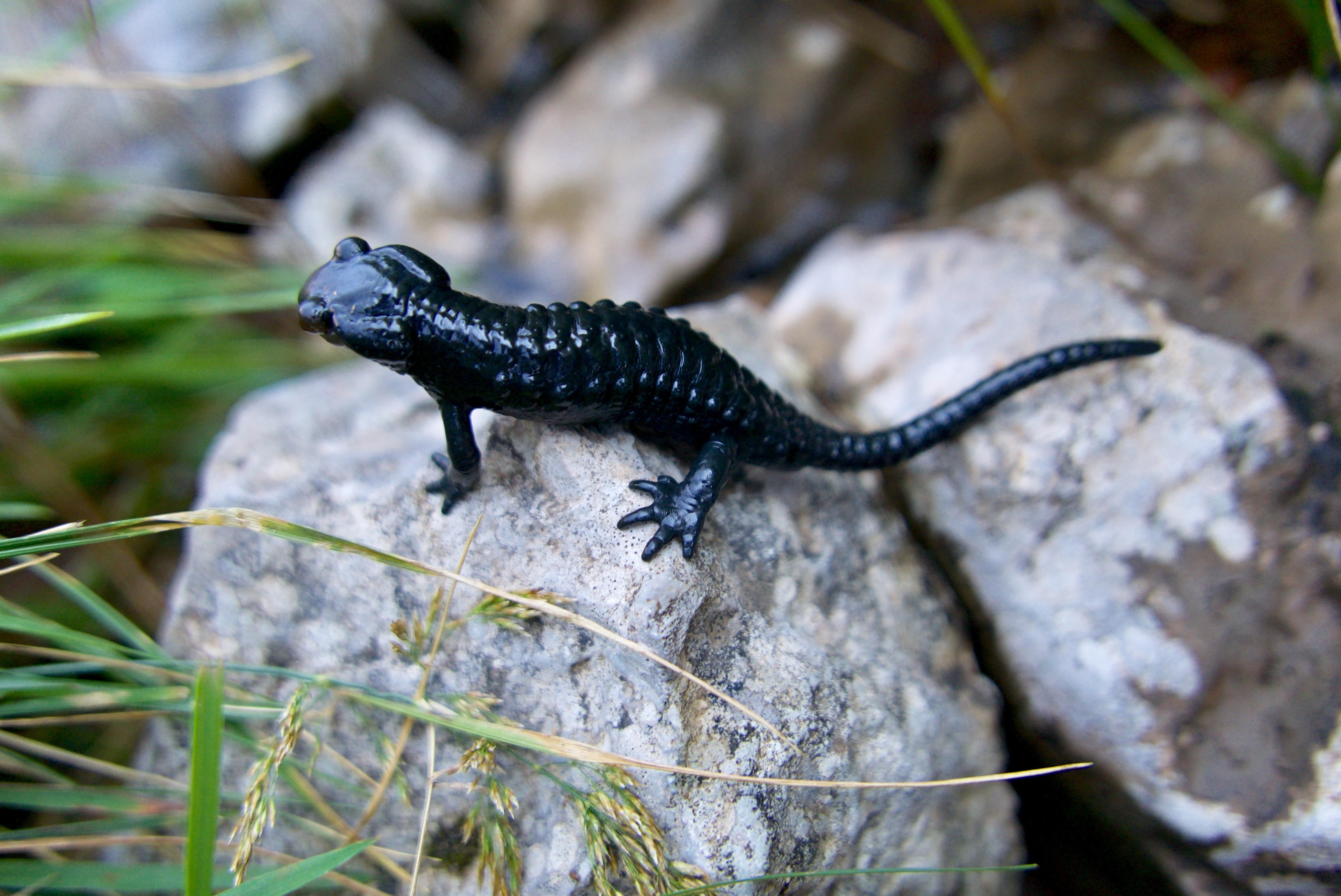 Schwarzer Alpensalamander, aufgenommen Anfang August um ca. 9:00 Uhr morgens in einer Hochalpenschlucht nahe eines Rinnsals auf ca. 1.900 m ü.NN.